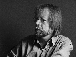 Photo du philosophe belge Robert Brisart